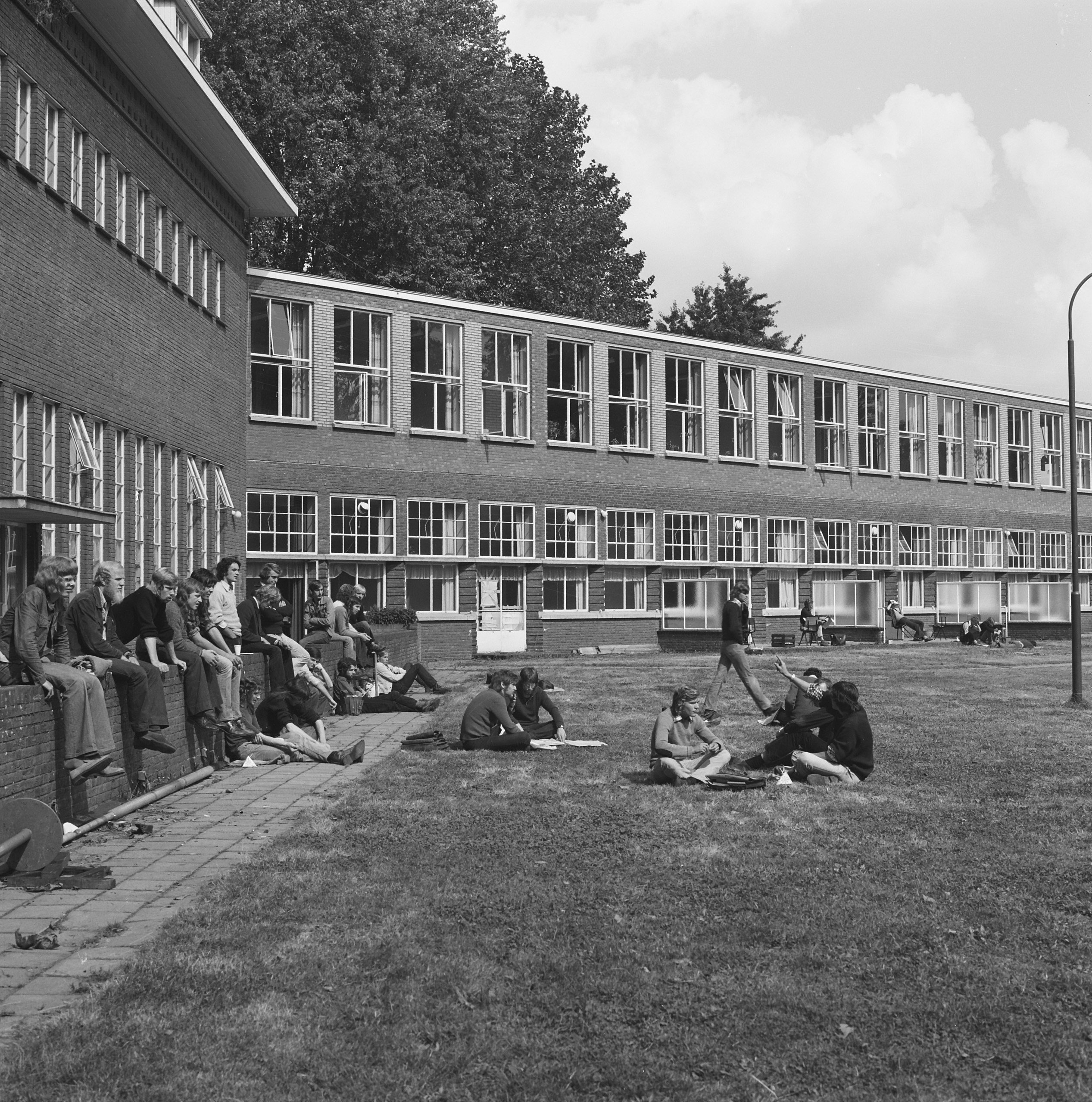 Collectie / Archief : Fotocollectie Nederlandse Heidemaatschappij Reportage / Serie : [ onbekend ] Beschrijving : gebouwen, hbcs huize larenstein Datum : september 1974 Locatie : Gelderland, Velp Trefwoorden : gebouwen Persoonsnaam : hbcs huize larenstein Fotograaf : [onbekend] Auteursrechthebbende : Nationaal Archief Materiaalsoort : Negatief (zwart/wit) Nummer archiefinventaris : bekijk toegang 2.24.06.02 Bestanddeelnummer : 167-0371